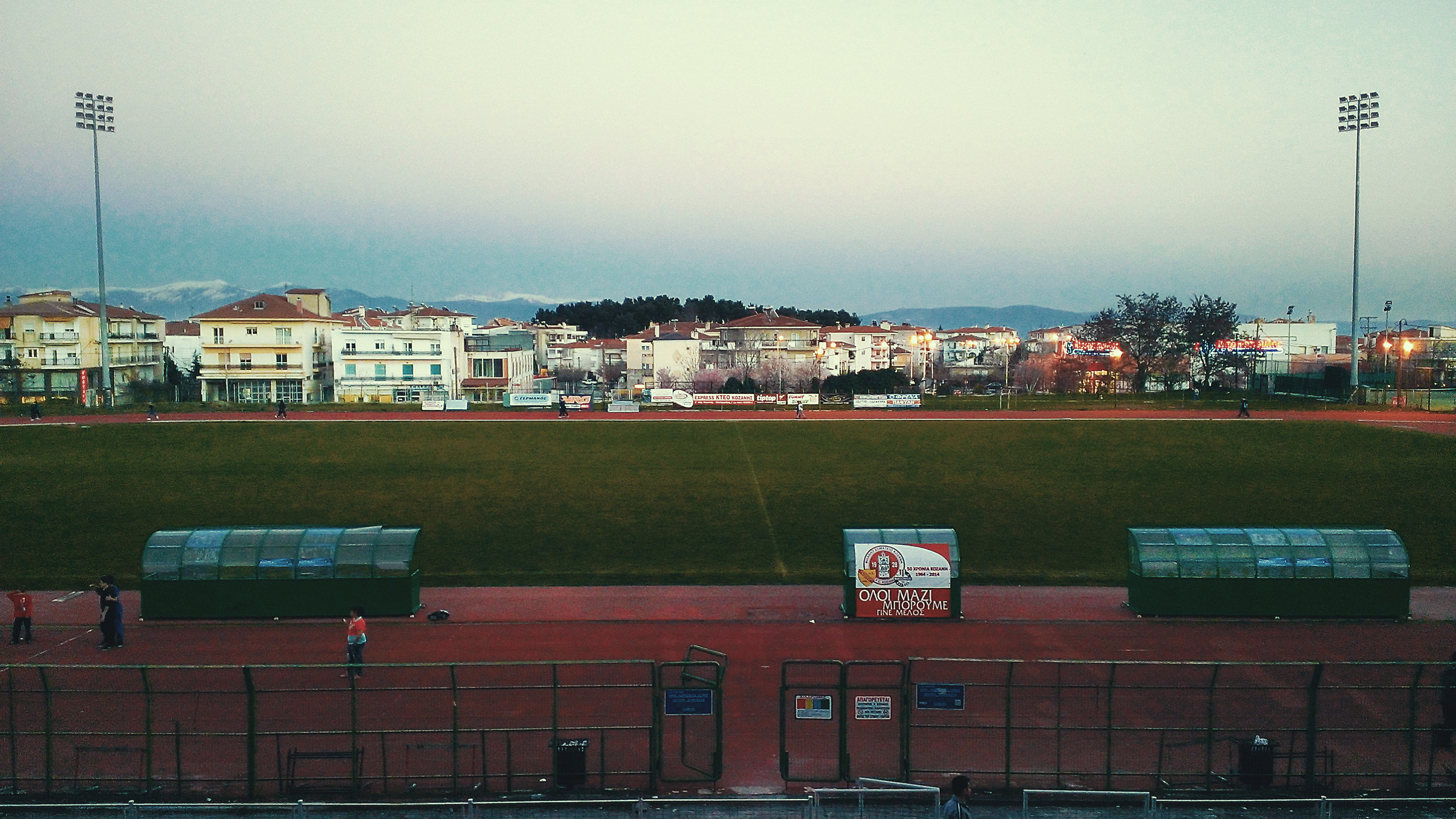 Δημοτικό Στάδιο Κοζάνης, Κοζάνη, Ελλάδα